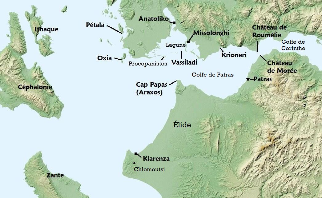 Golfe de Patras au cours de la guerre d'indépendance